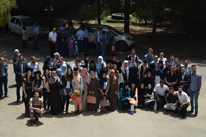 cérémonie de cloture